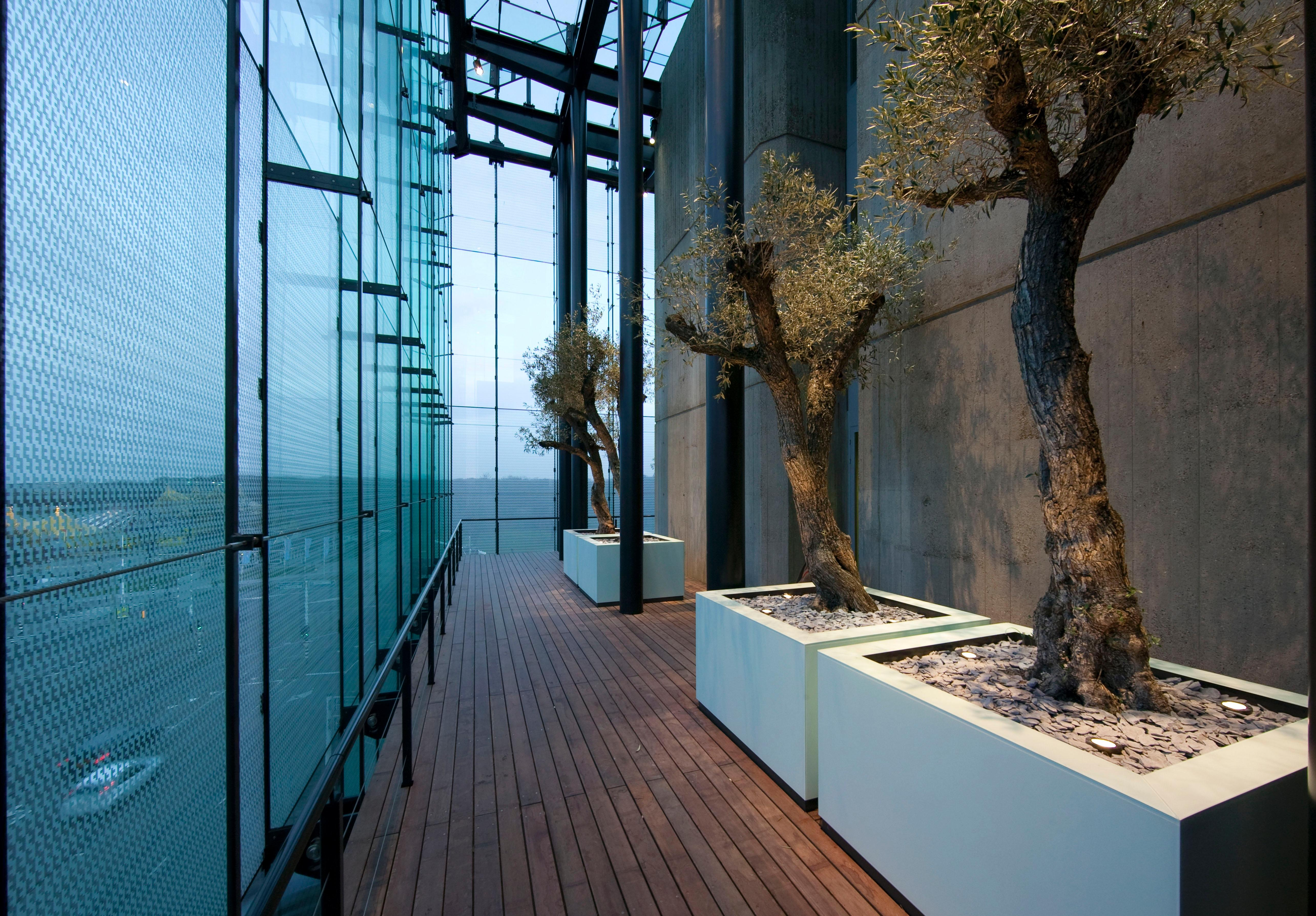 Wintertuin Ministerie van Financiën - na de renovatie.